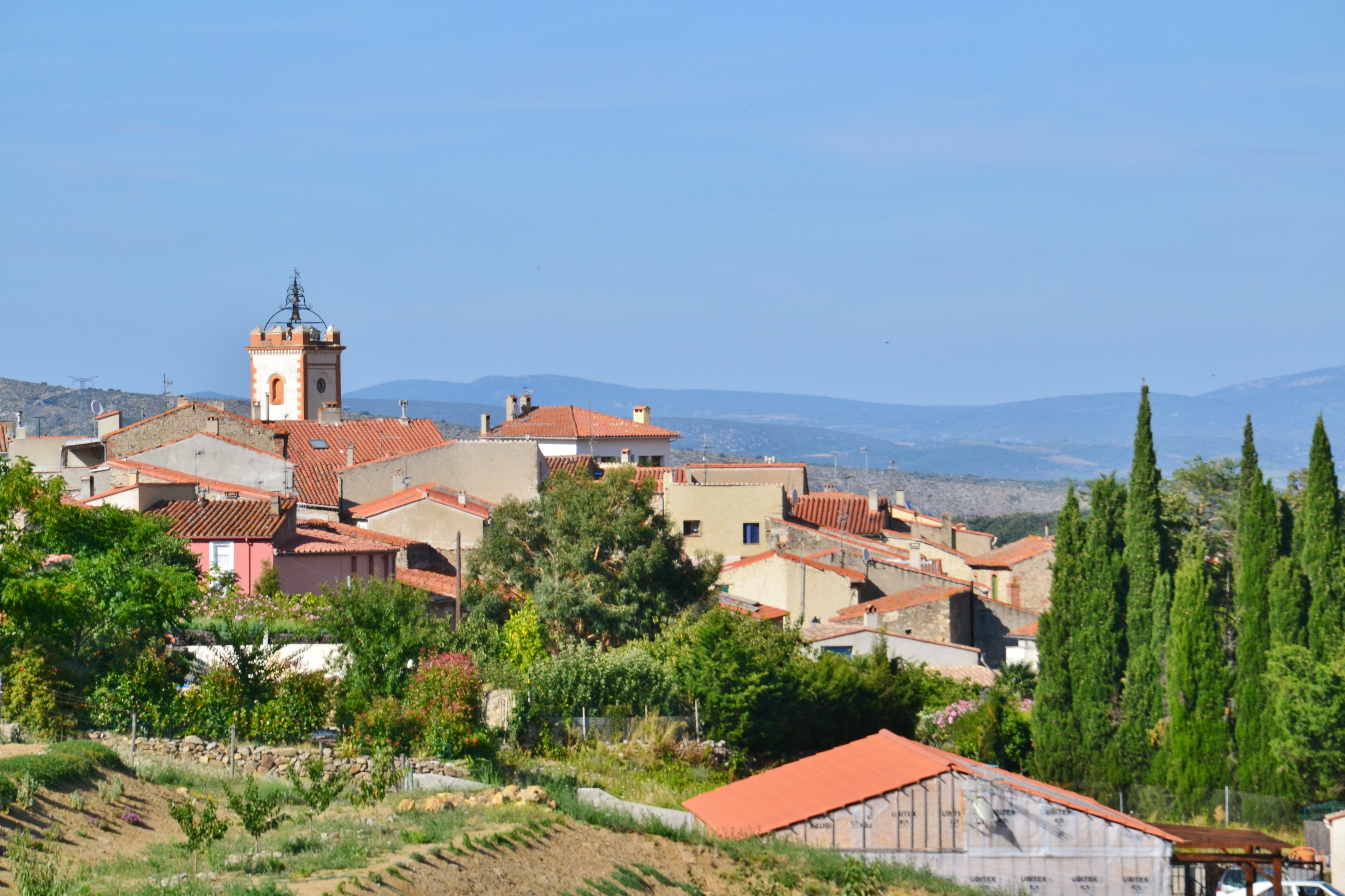 Le village de Cassagnes (Pyrénées-Orientales, France)